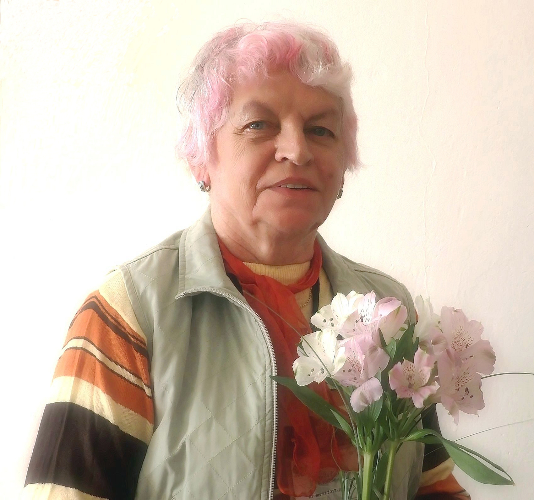 česká esperantistka, členka klubu v Ostravě